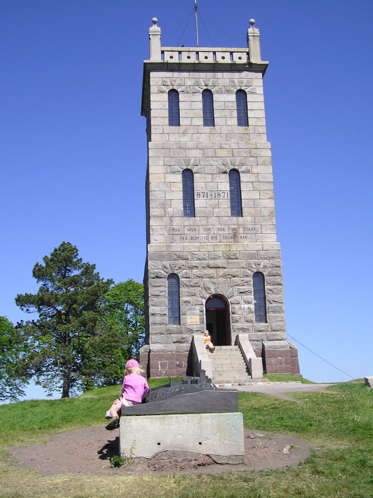 Slottsfjellet, Tønsberg - Oldest city in Norway. Built in 1888. Tønsberg celebrated 1000 years as a city... Text on tower: Maa byen som paa tunet staar få blomstre nye 1000-aar. 2005 - Minto